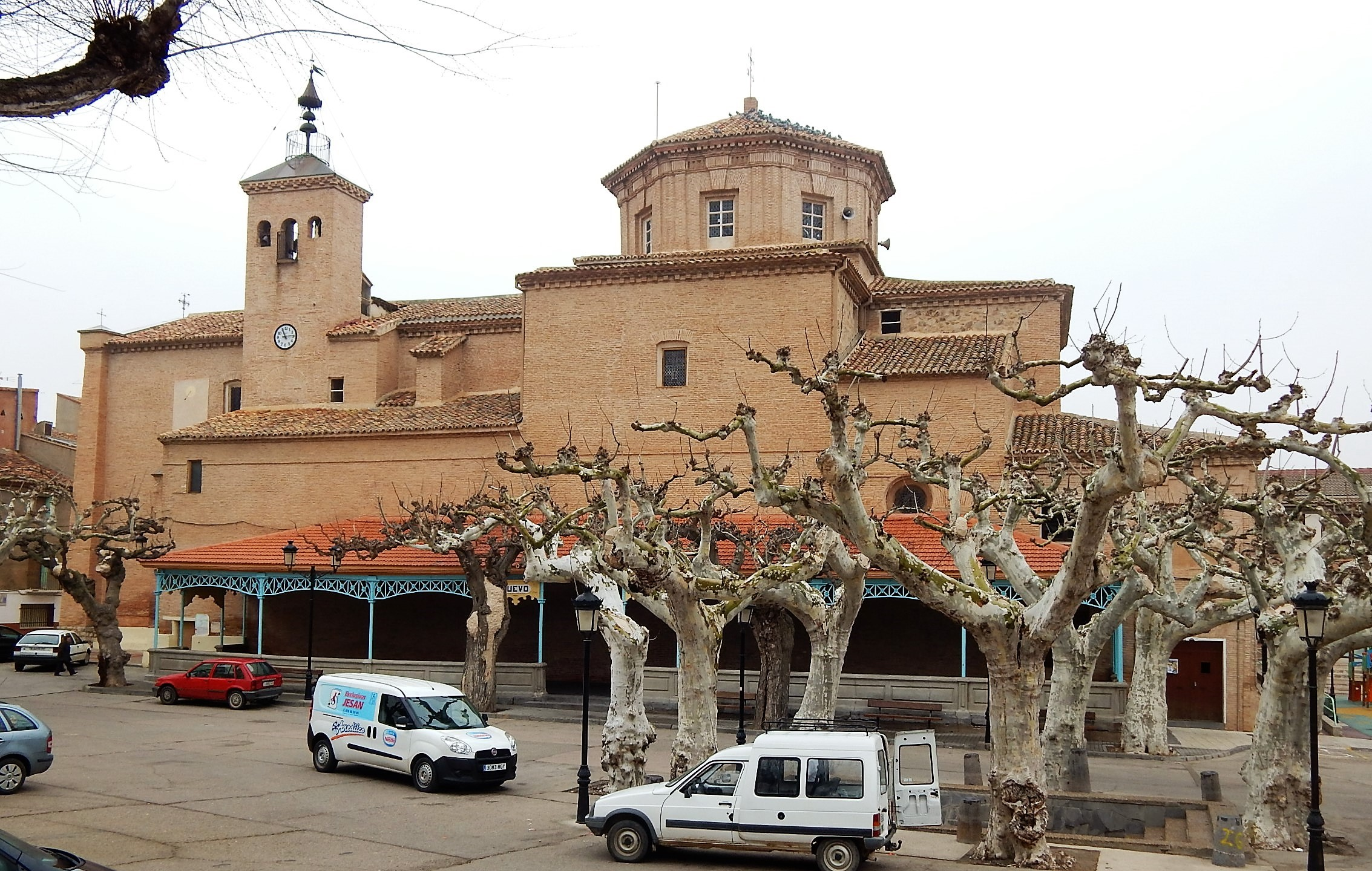 Iglesia de la Anunciación, Almonacid de la Sierra (Aragón, España)